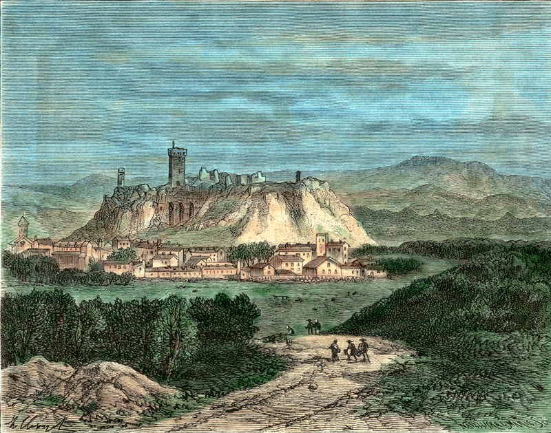 Gravure représentant les vestiges du château de Polignac (Haute-Loire)/ Engraving showing the remains of Polignac's astle, Haute-Loire.